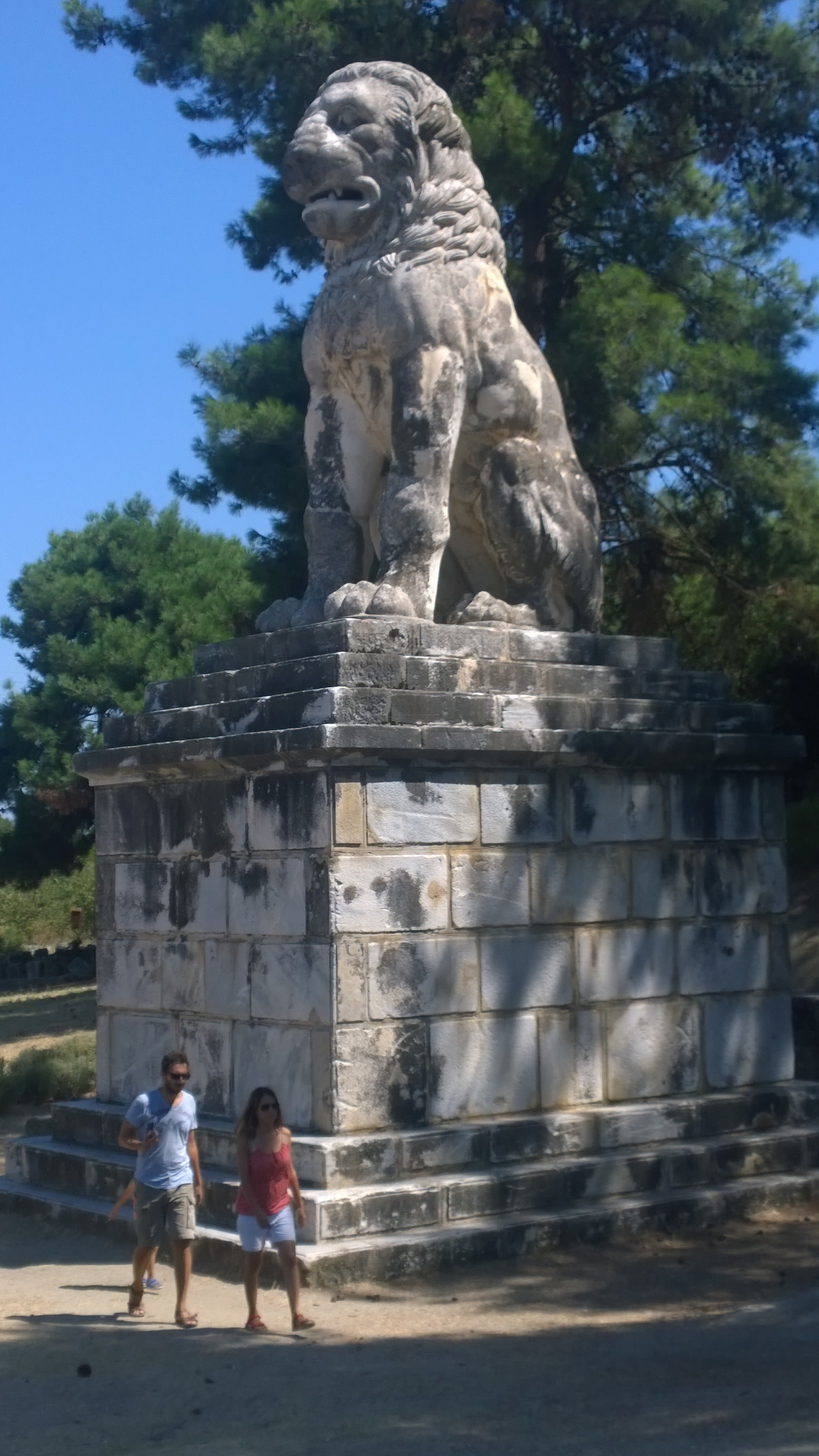 «Αμφίπολις»